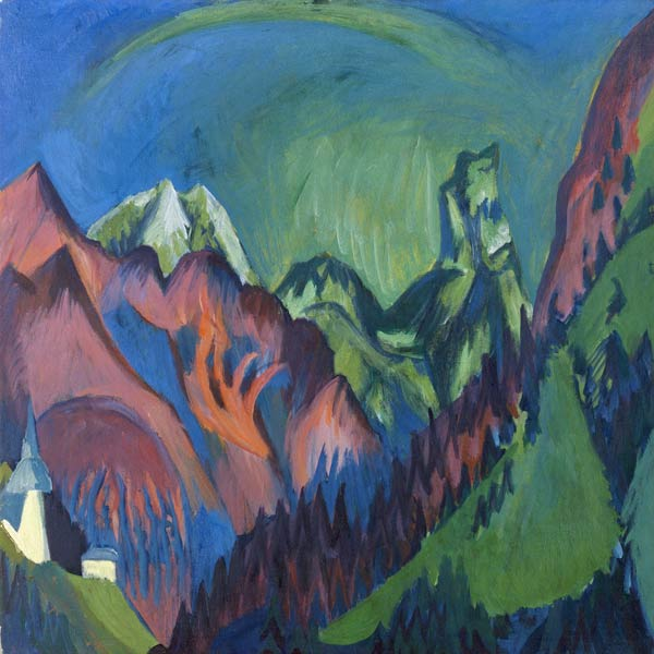 Tinzenhorn - Zügenschlucht bei MonsteinTinzenhorn - Zügencanyon near Monsteintitle QS:P1476,de:"Tinzenhorn - Zügenschlucht bei Monstein" label QS:Lde,"Tinzenhorn - Zügenschlucht bei Monstein"